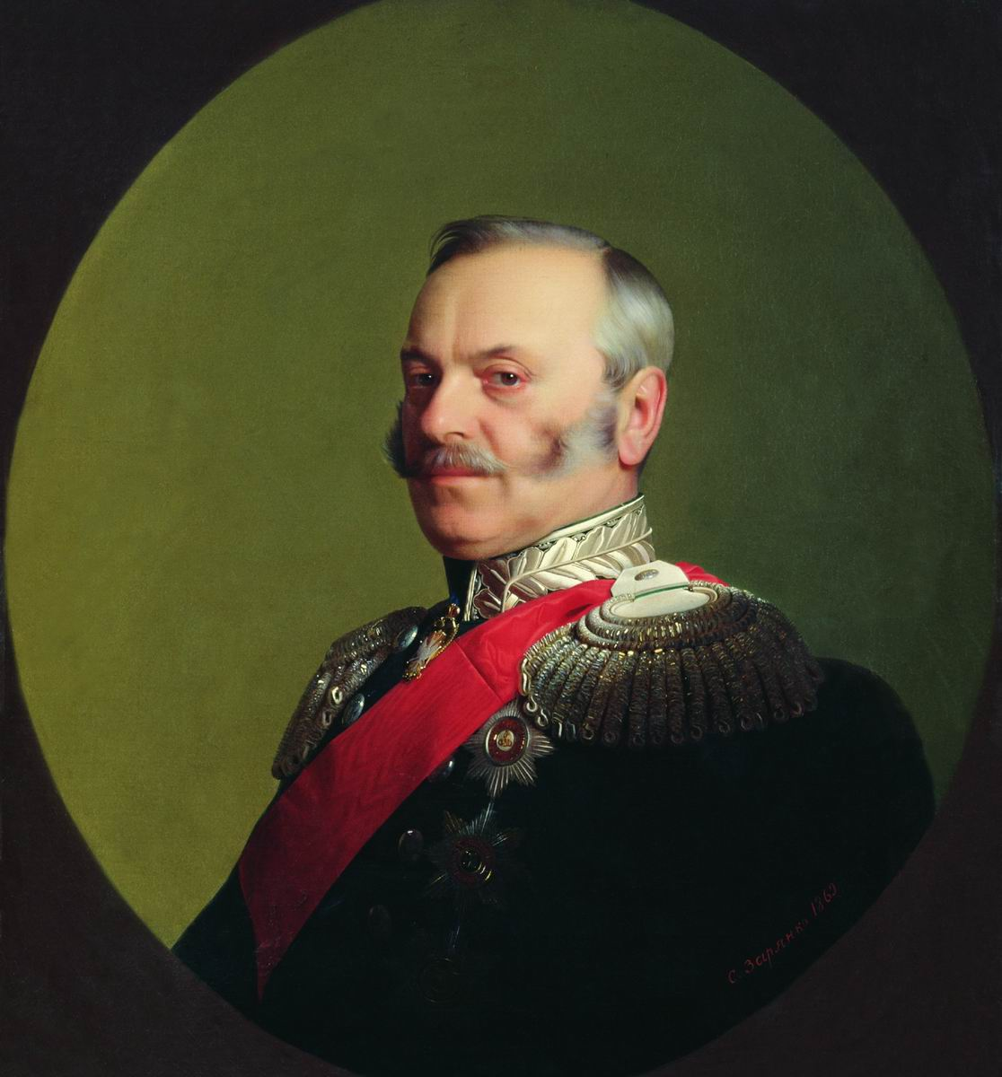 Портрет министра путей сообщения Павла Петровича Мельникова